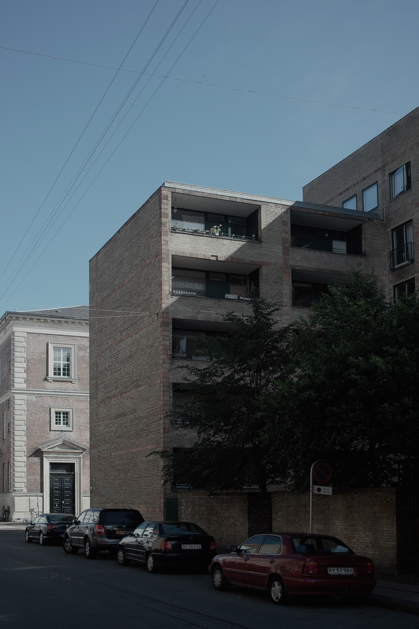 Borgergaarden at the corner of Adelgade and Klærkegade in central Copenhagen, Denmark